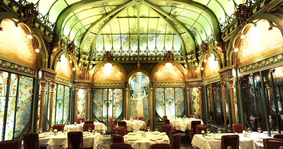 Décor du restaurant la Fermette Marbeuf